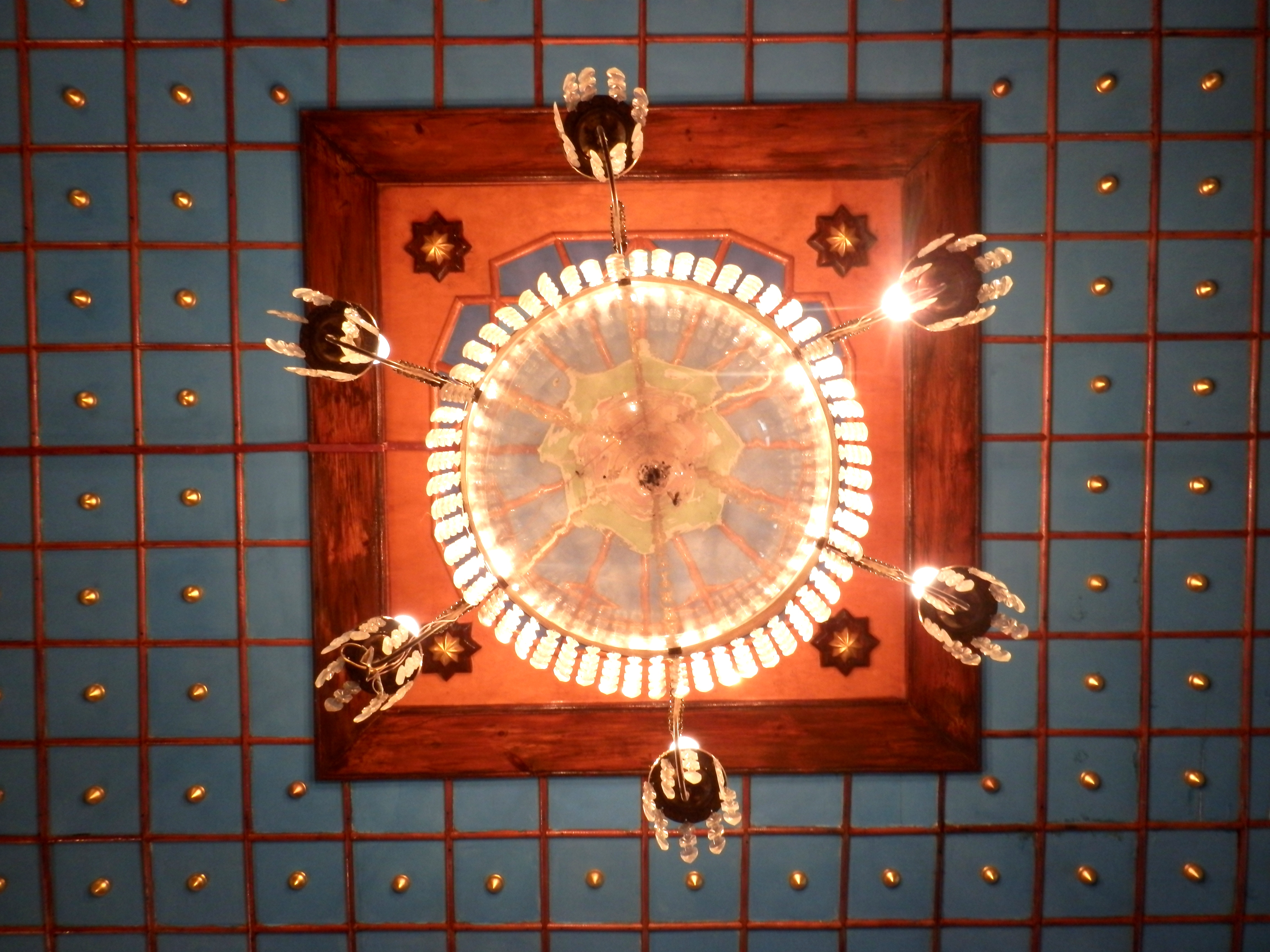 Бахчисарайський палацово-парковий комплекс (Ханський палац), Бахчисарай, вул. Річкова, 133